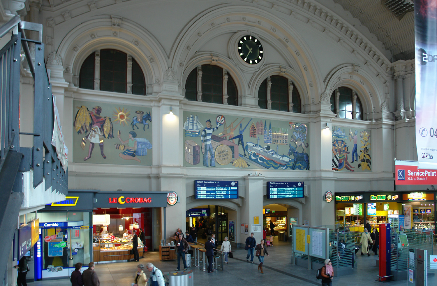 Bremen Hauptbahnhof: Wandmosaik der Bremer Zigarettenfabrik Martin Brinkmann AG aus den 1920er Jahren